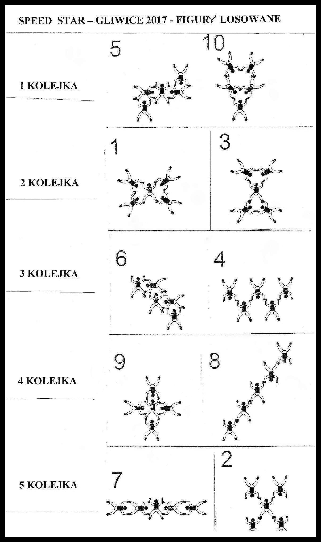 II Zawody Speed–Star – Zawody spadochronowe Antek – Gliwicka Gwiazda 2017, figury losowane